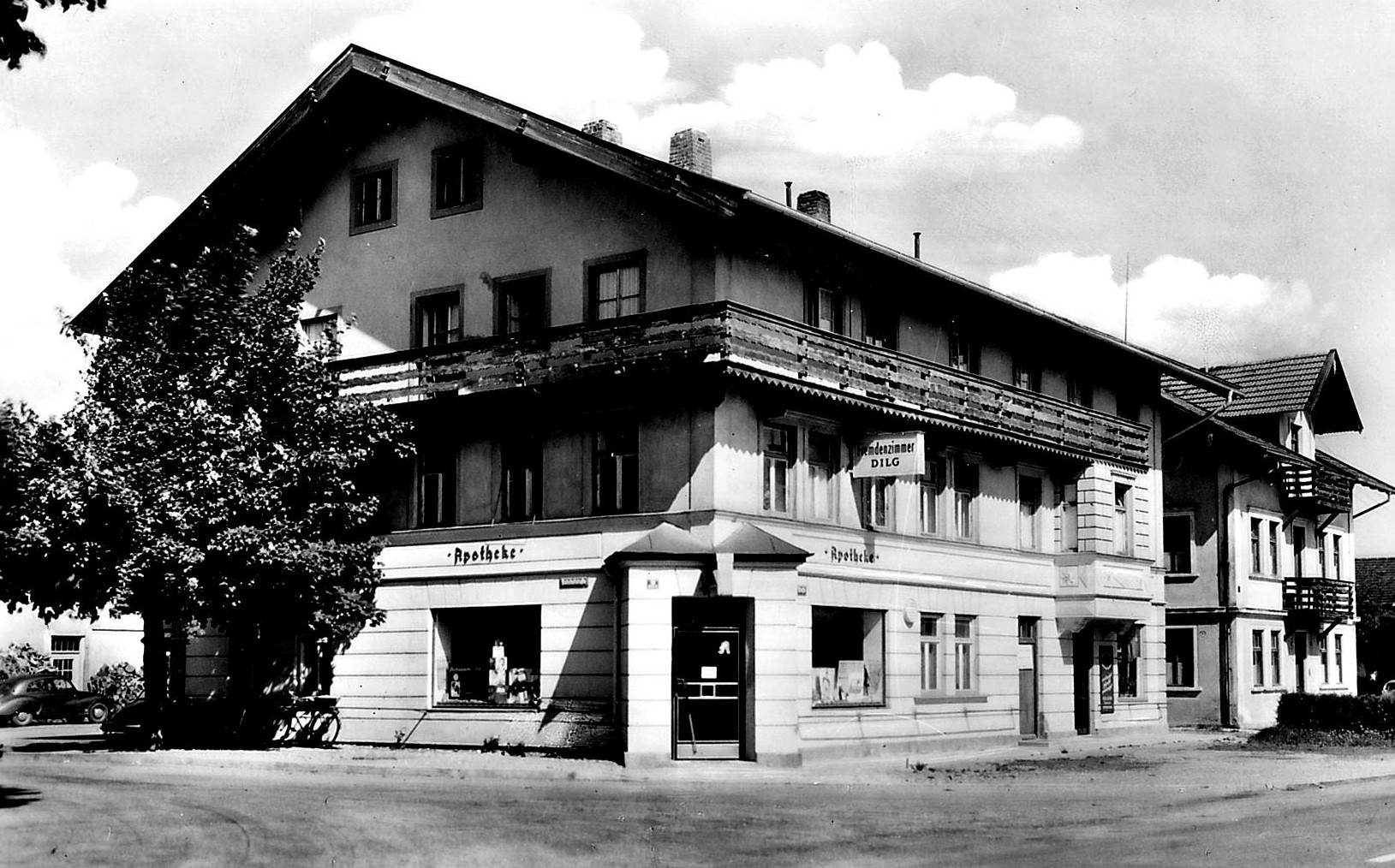 Auf dem Bild ist Apotheke am Bahnhof und das Fremdenzimmer Dilg